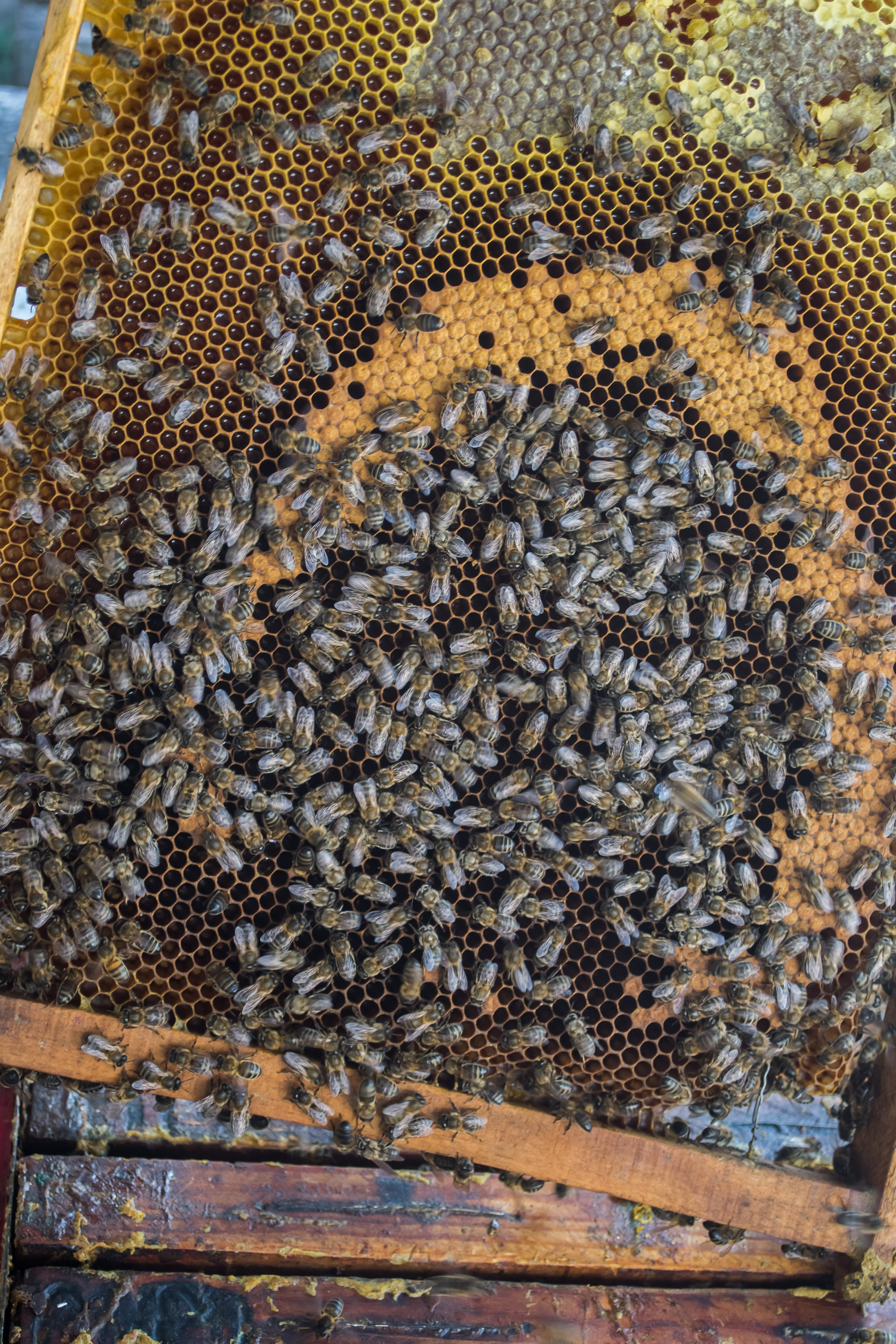 Abejas melíferas en el Primer Corte de la Miel, en Ayora, Valencia.